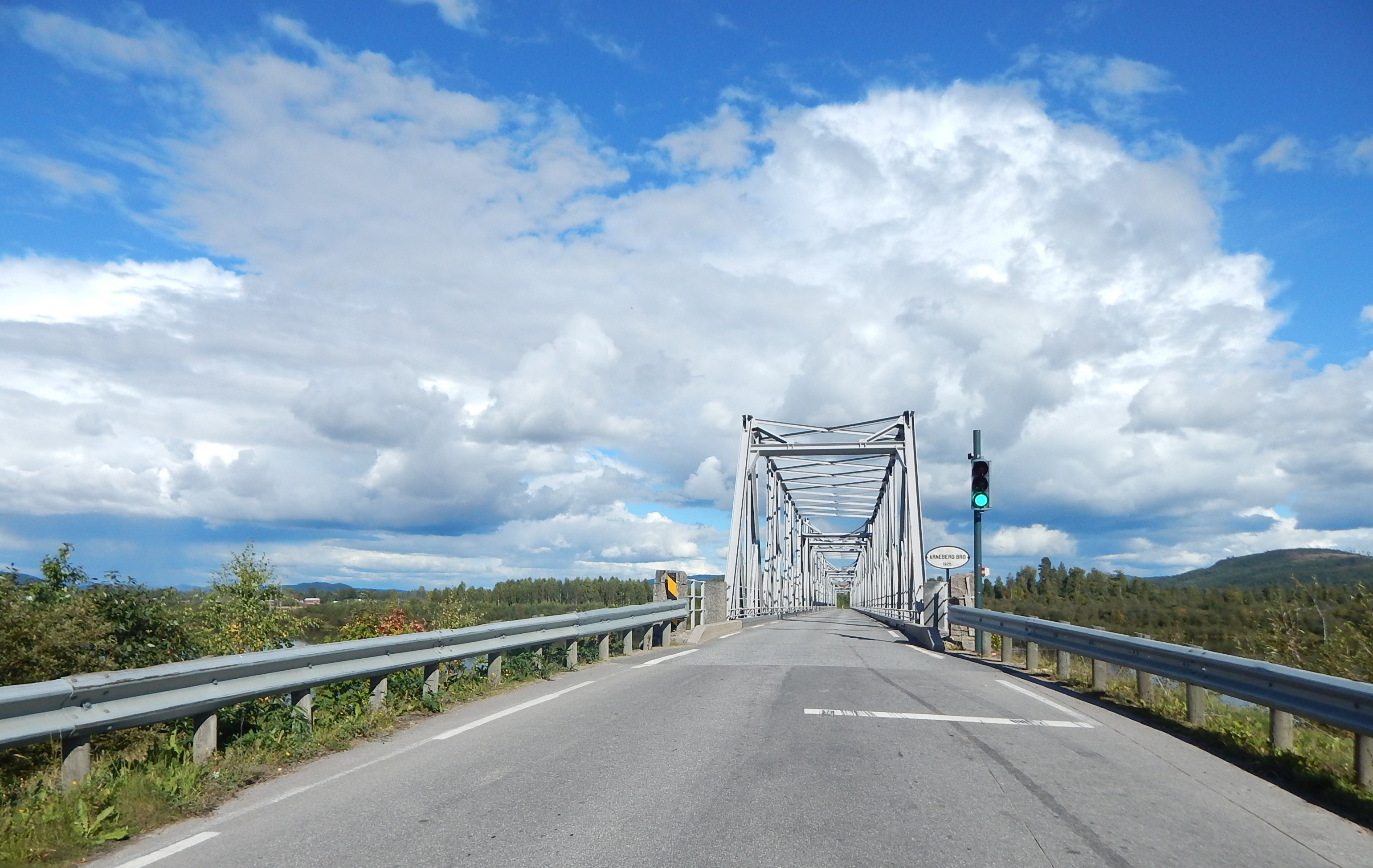 Hofvegen (fylkesvei 434) mot Arneberg bru sørvestfra